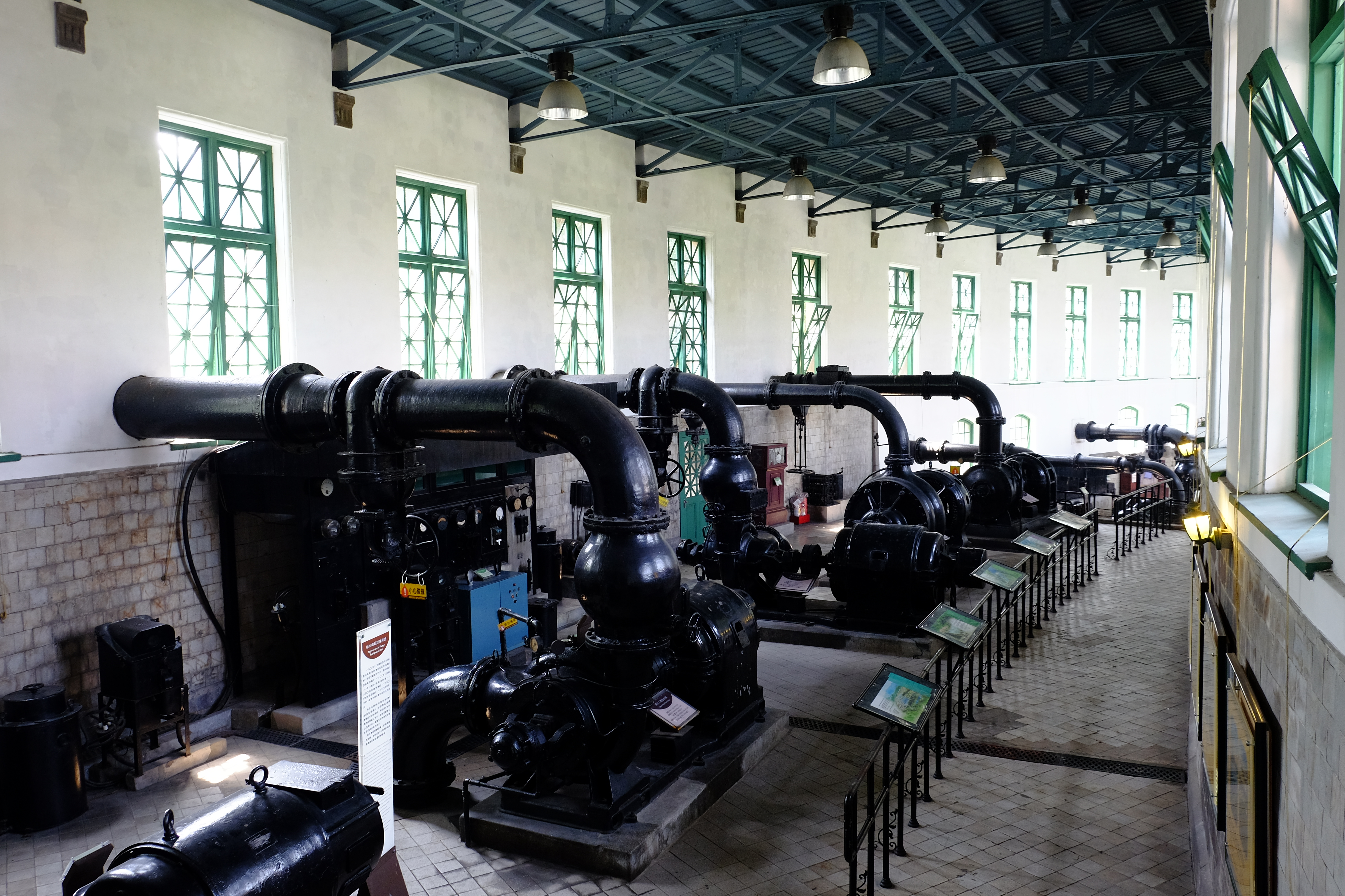 臺北水道水源地